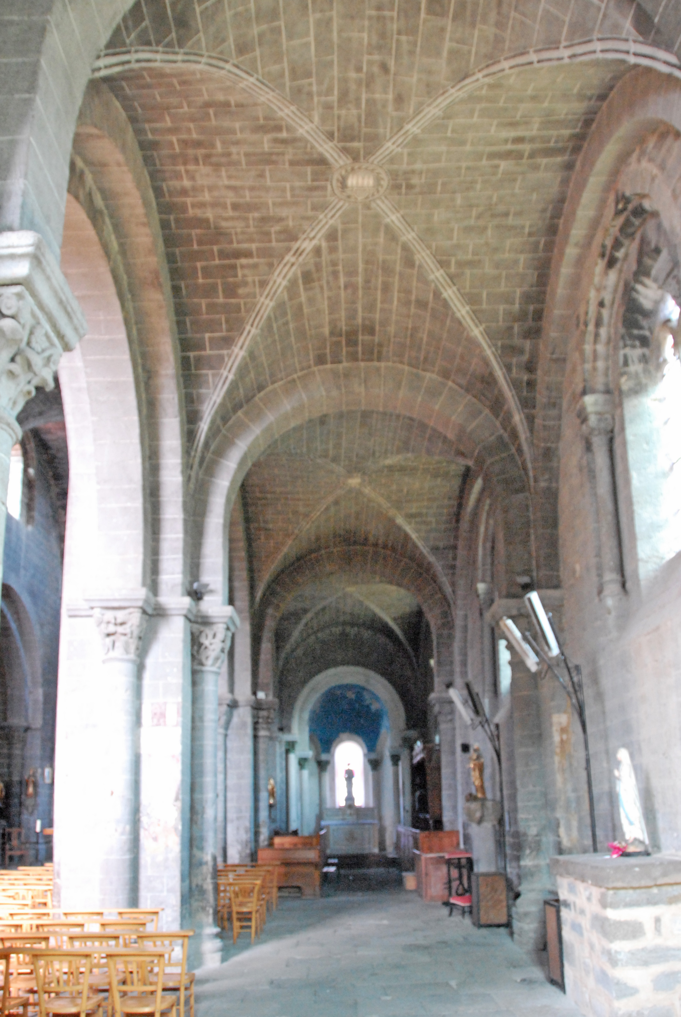 Chanteuges, Kirche, südl. Seitenschiff, Kreuzgratgewölbe, Gurtbogen